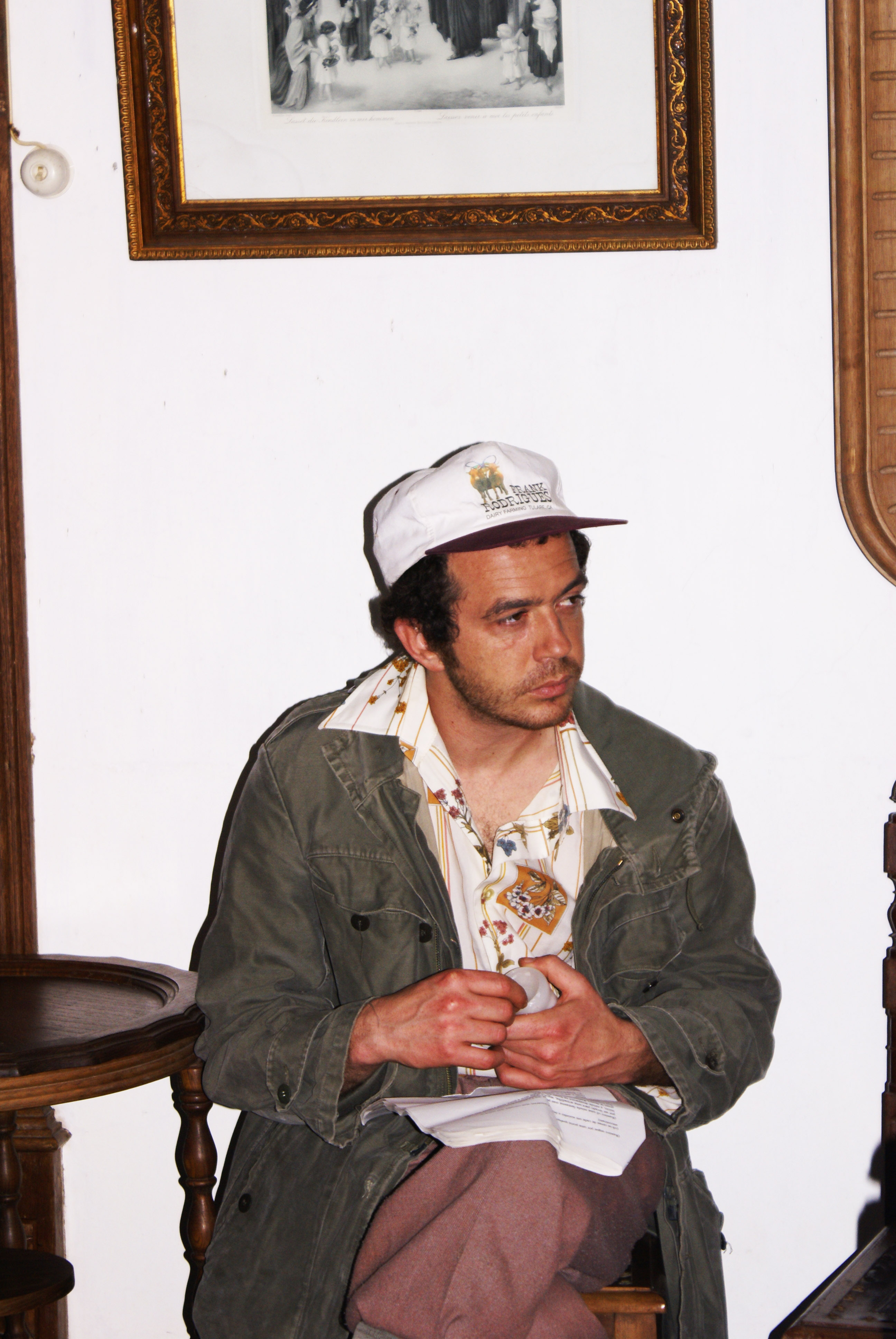 Fala Quem Sabe, episódio A casa assombrada, Filmado na Villa Maria